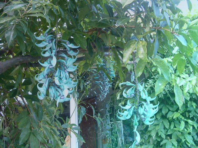 Strongylodon macrobotrys, La Réunion, 2005